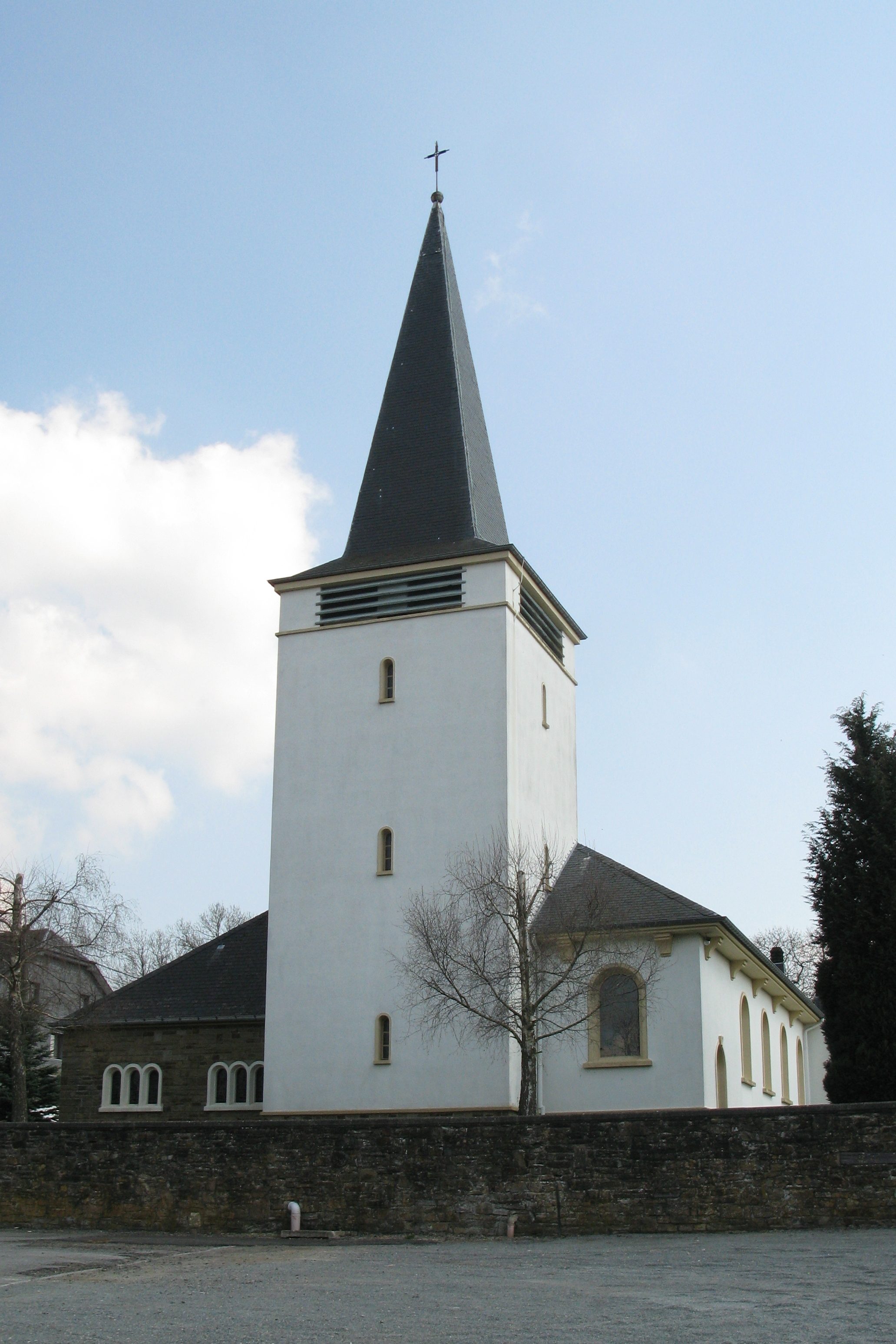 D'Kierch vu Grüfflingen (2010).